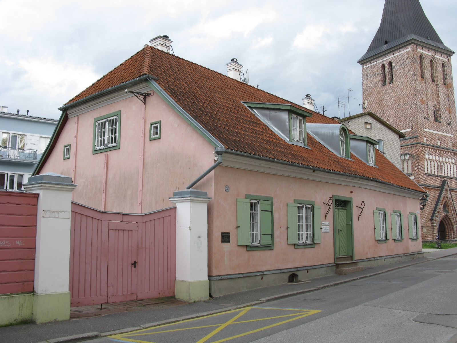 Uppsala maja Tartus Jaani tänaval, vaade Laia tänava poolt, 20. juuli 2012. Foto: Oop.